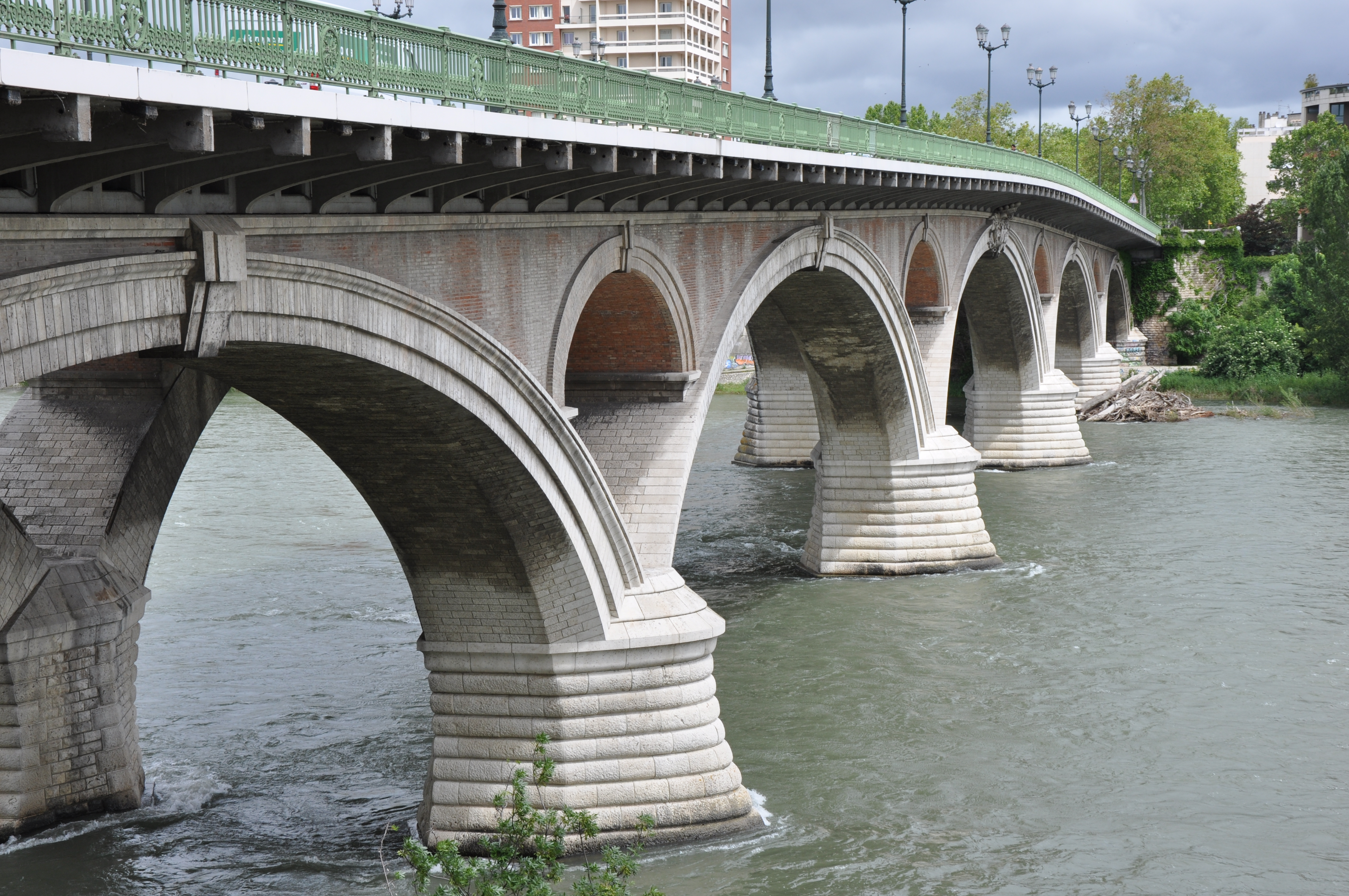 Pont des Catalans, Garonne; Toulouse